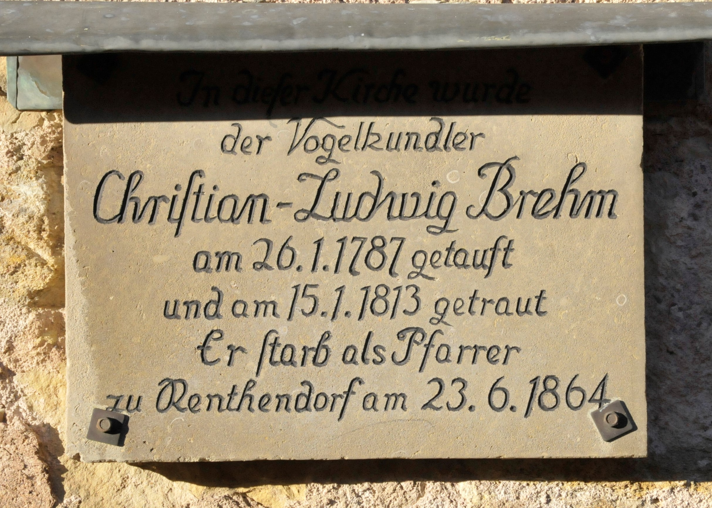 Schönau vor dem Walde, Gedenkschild an Christian Ludwig Brehm